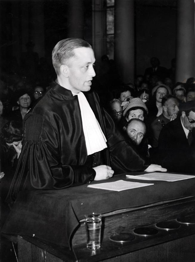 Verdediger Mr. K. van Rijckevorsel tijdens zijn pleidooi in het proces Rauter. Nederland, [1948]. Plaats van handeling: Balzaal, Paleis Kneuterdijk, Den Haag (zie de pilaren)